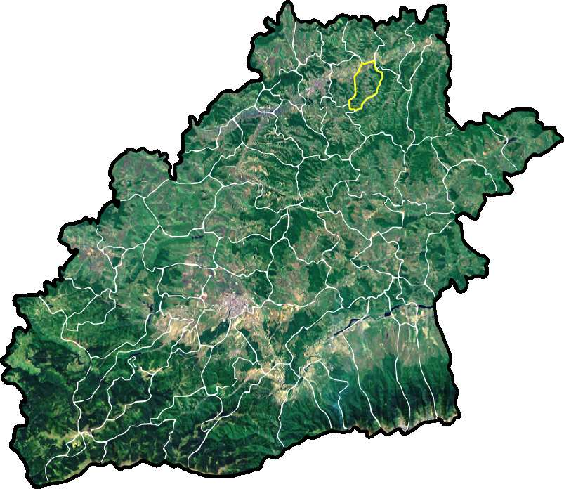 Atel jud Sibiu.